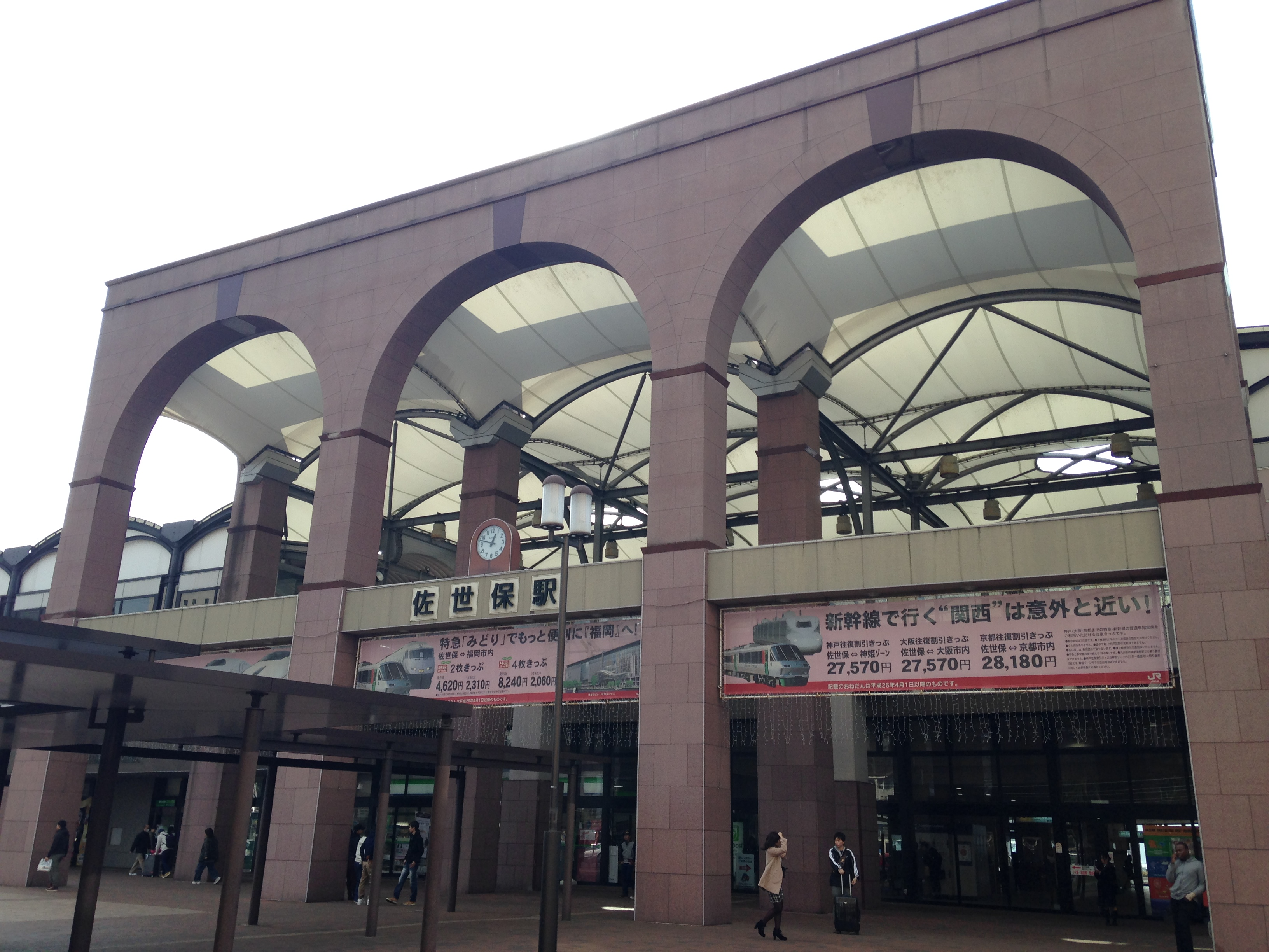 佐世保駅駅舎(東口)